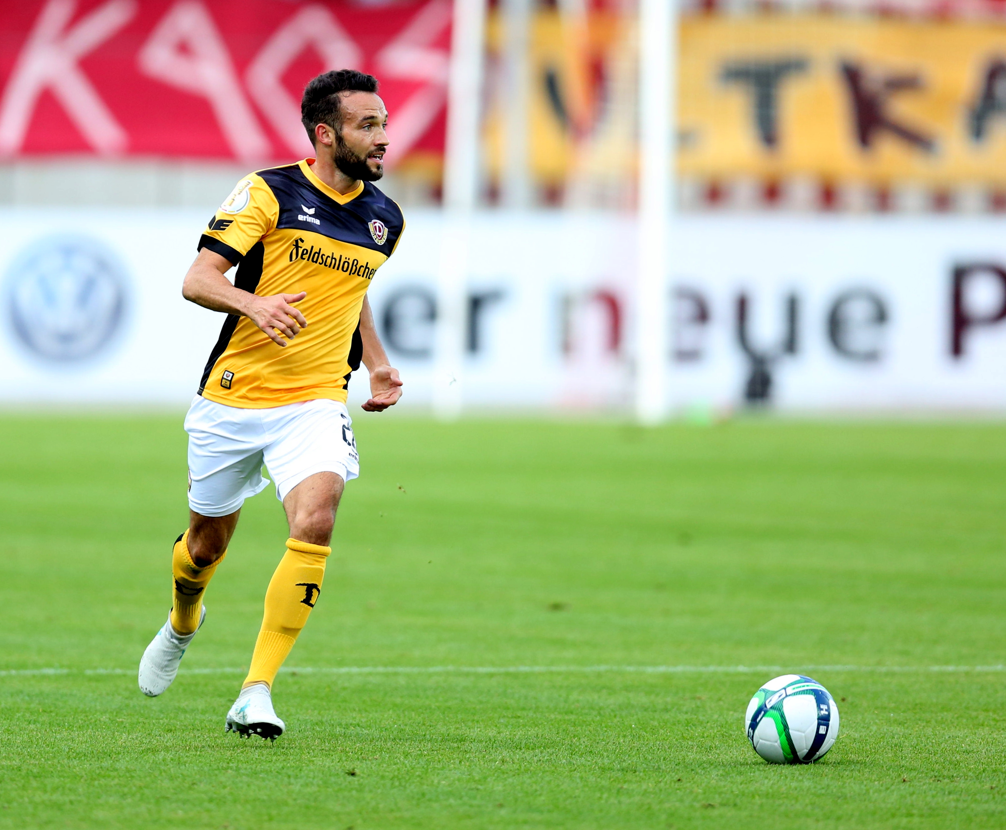 DFB-Pokal 2017/18, 1. Hauptrunde, TuS Koblenz gegen SG Dynamo Dresden: Fabian Müller (SG Dynamo Dresden)